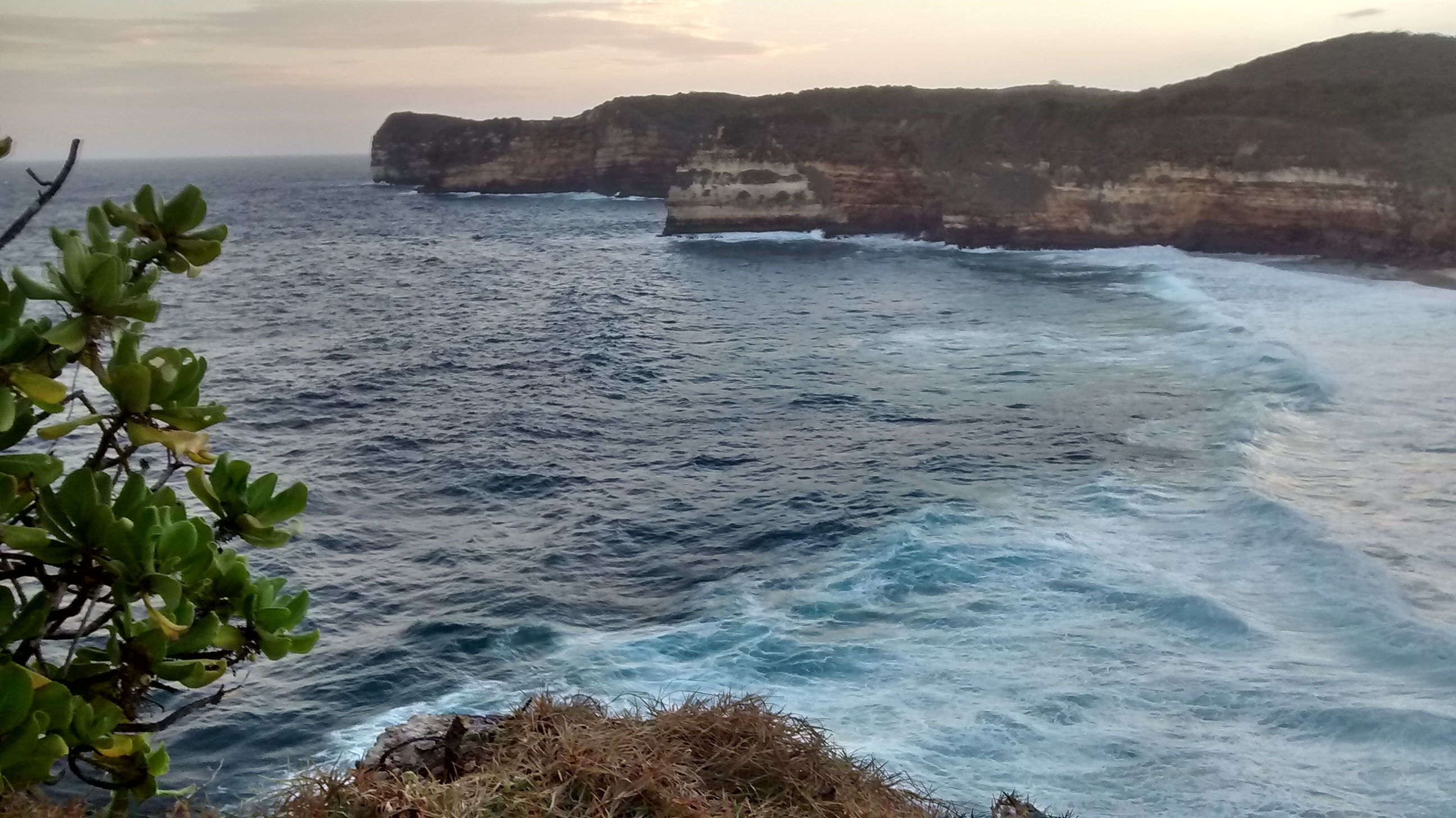 Mertak, Pujut, Central Lombok Regency, West Nusa Tenggara, Indonesia